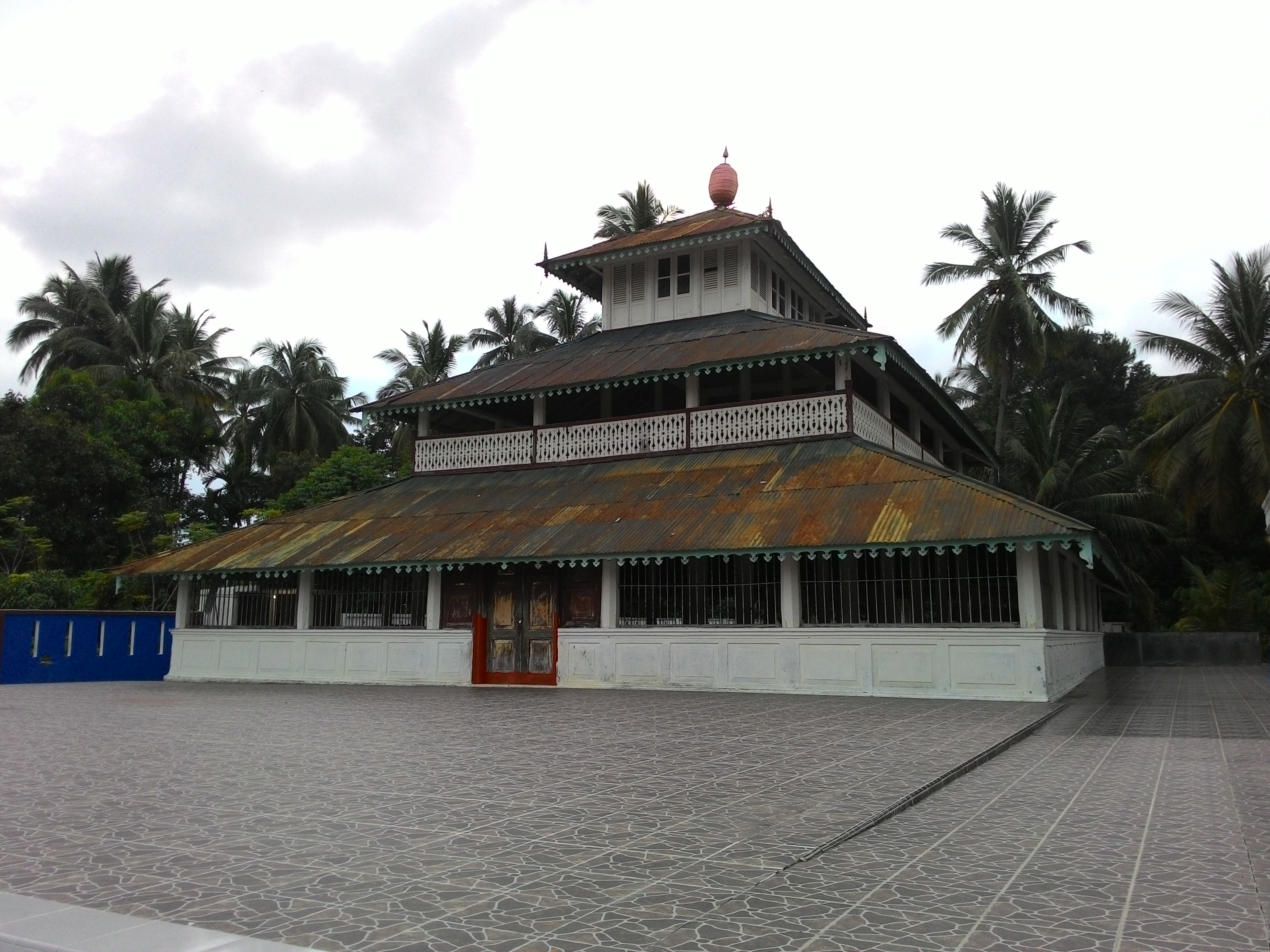 Masjid Poteu Meureuhom di Labui, Pidie